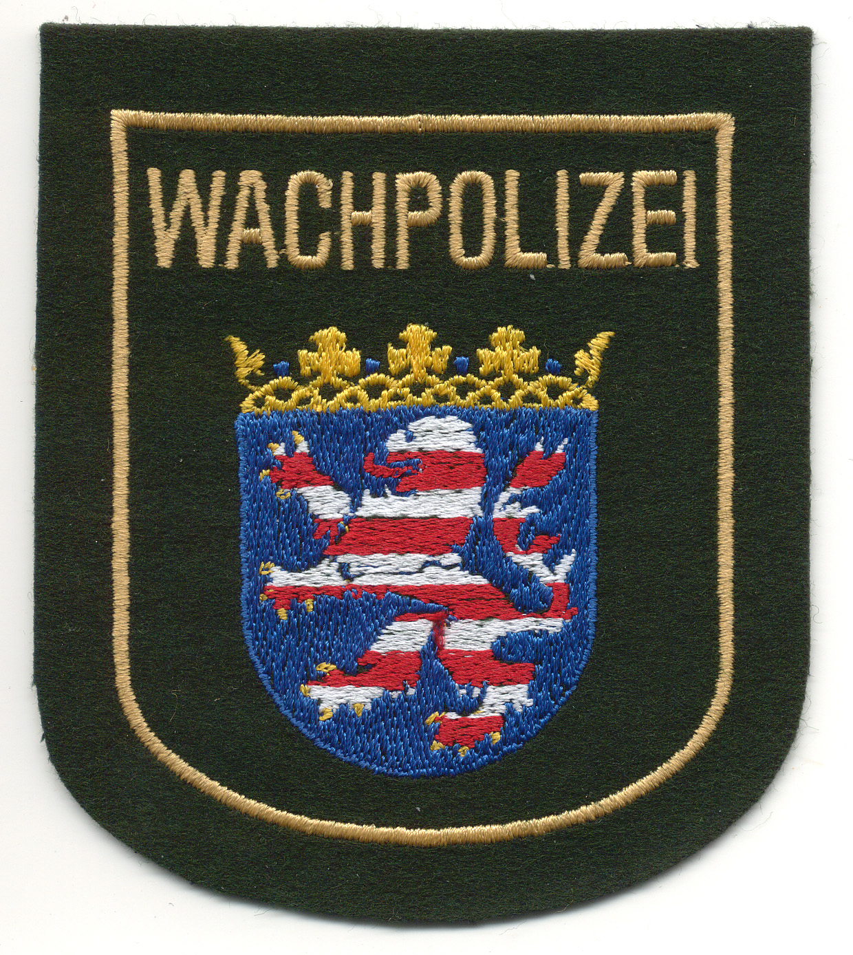 Ärmelabzeichen der Wachpolizei Hessen (alte Version)